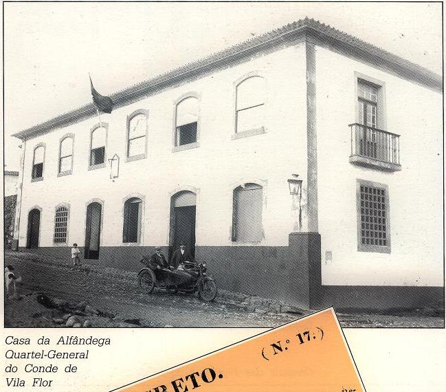 Casa da Alfândega, Quartel-general do conde de Vila-Flor.